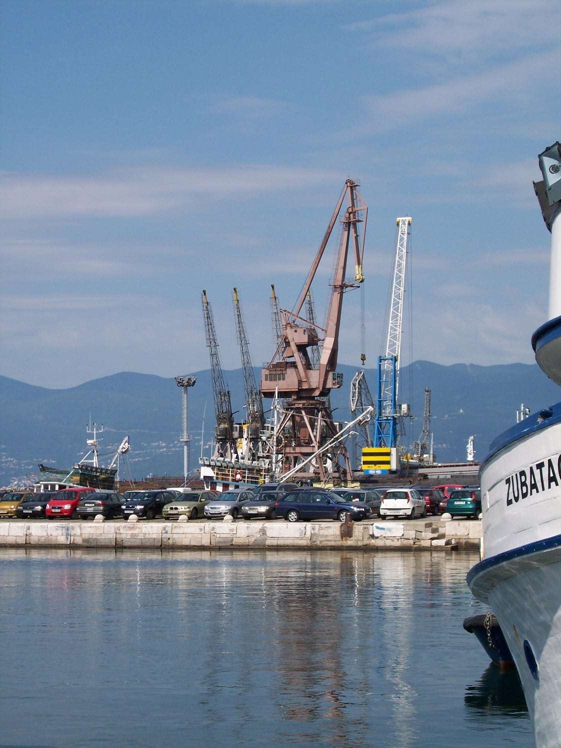 Rijeka (Croatia) Italian and Hungarian name: Fiume